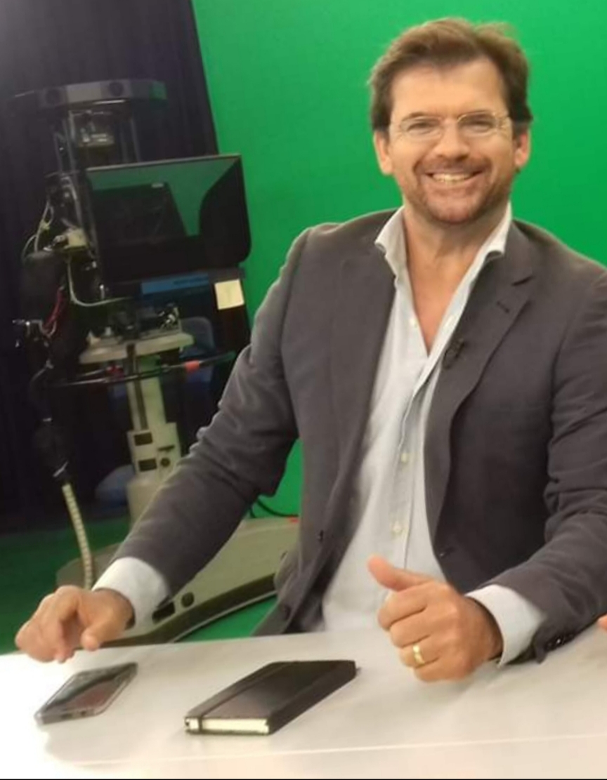 Miguel Szymanski im Studio 4 des Öffentlich-rechtlichen Fernsehsenders RTP in Lissabon, Portugal. Foto vor der Aufnahme des wöchentlichen TV-Programms 'Mundo sem Muros' (dt. "Welt ohne Grenzen").